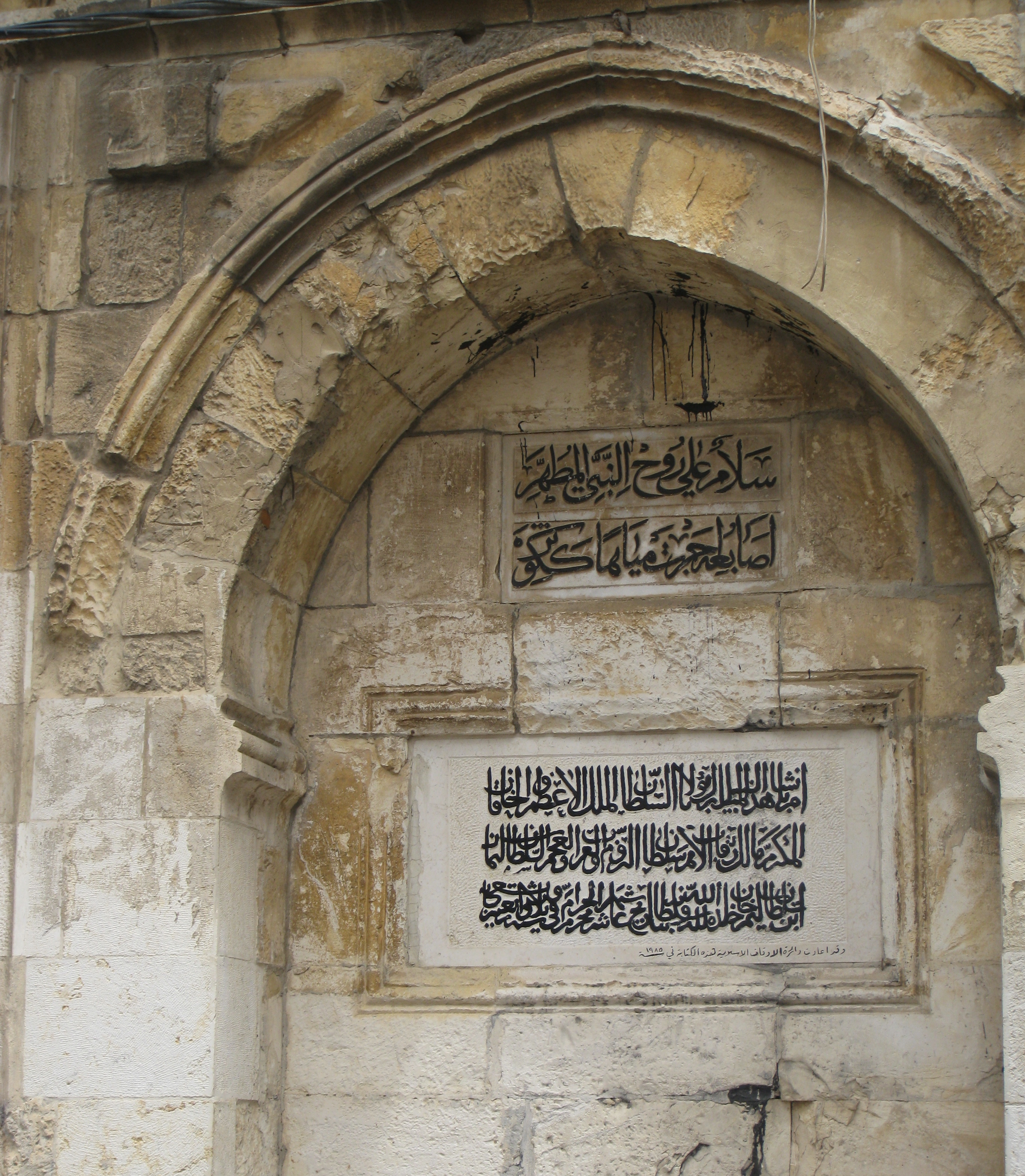 Muslim Quarter הרובע המוסלמי בירושלים